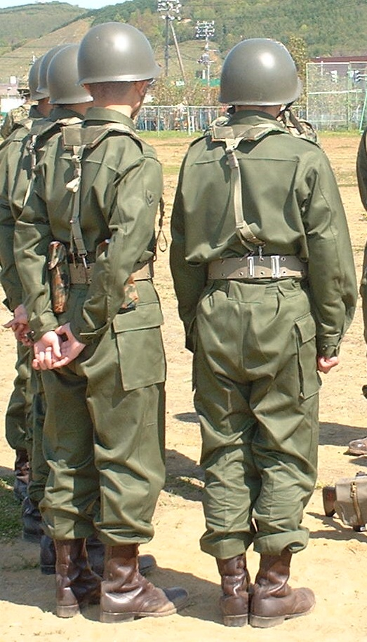 65式作業服、後ろ姿で90年代に撮影